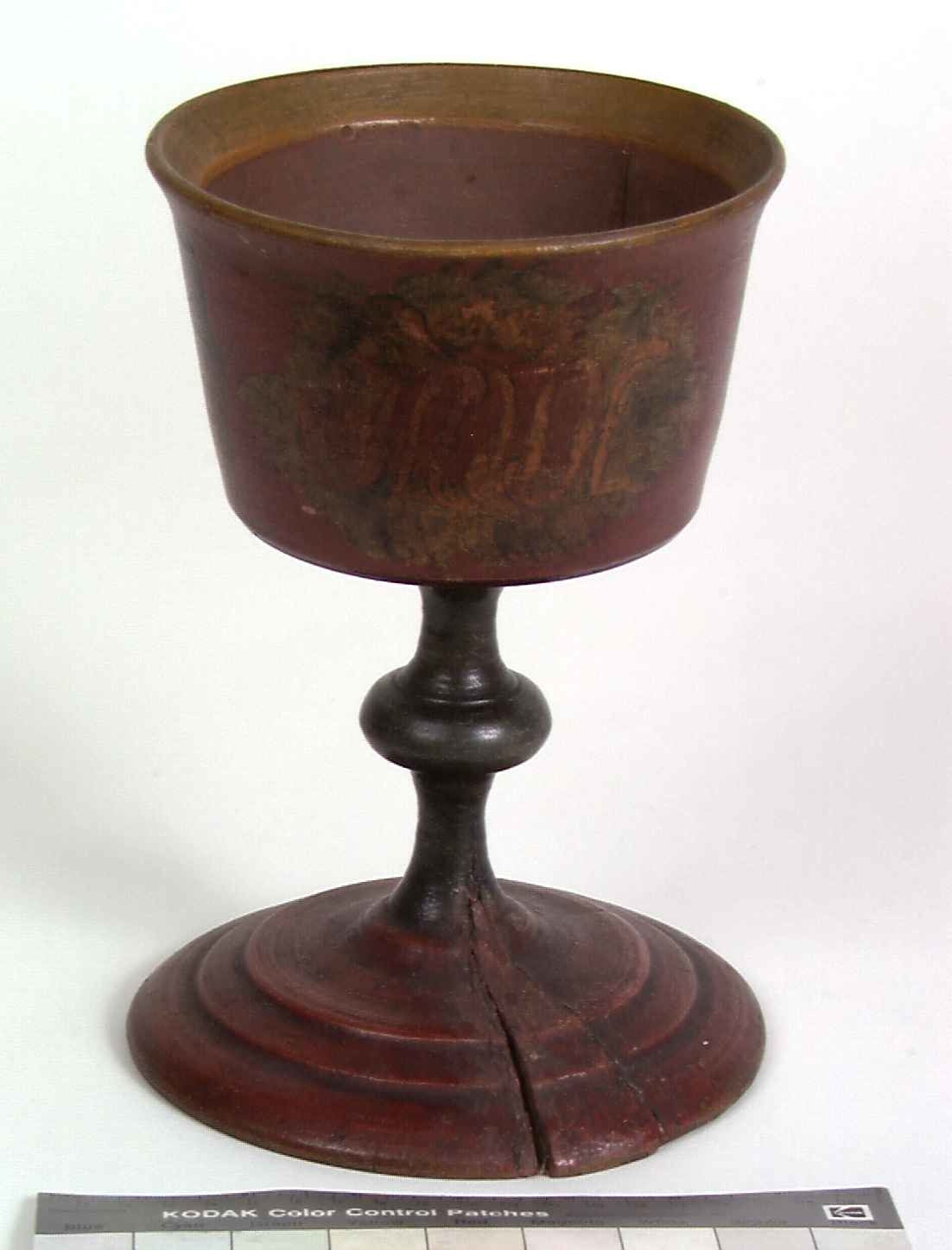 Alterkalk av tre fra Torpo kirke, Ål i Hallingdal